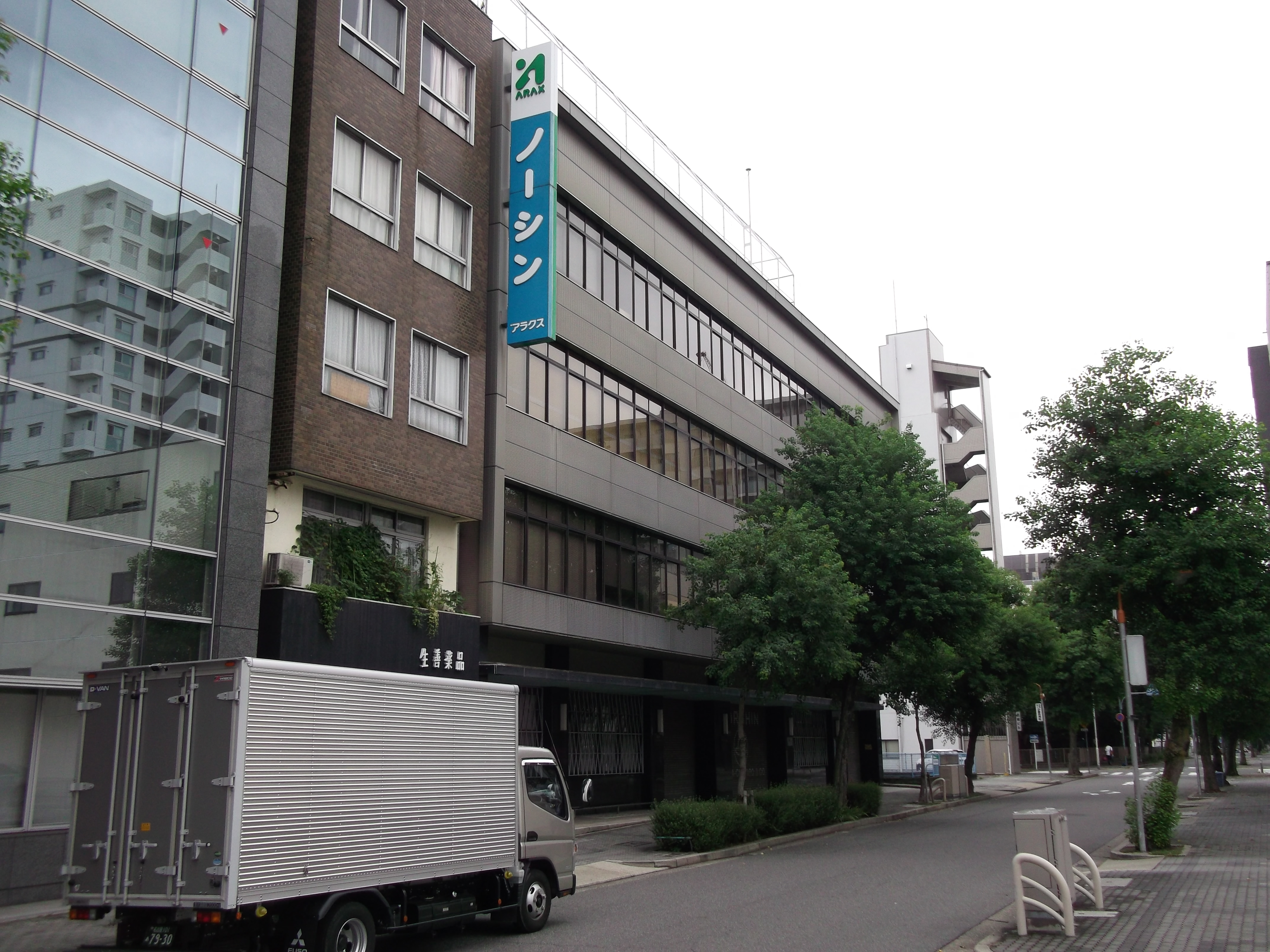 名古屋市中区丸の内のアラクス本社を南側公道西側より撮影